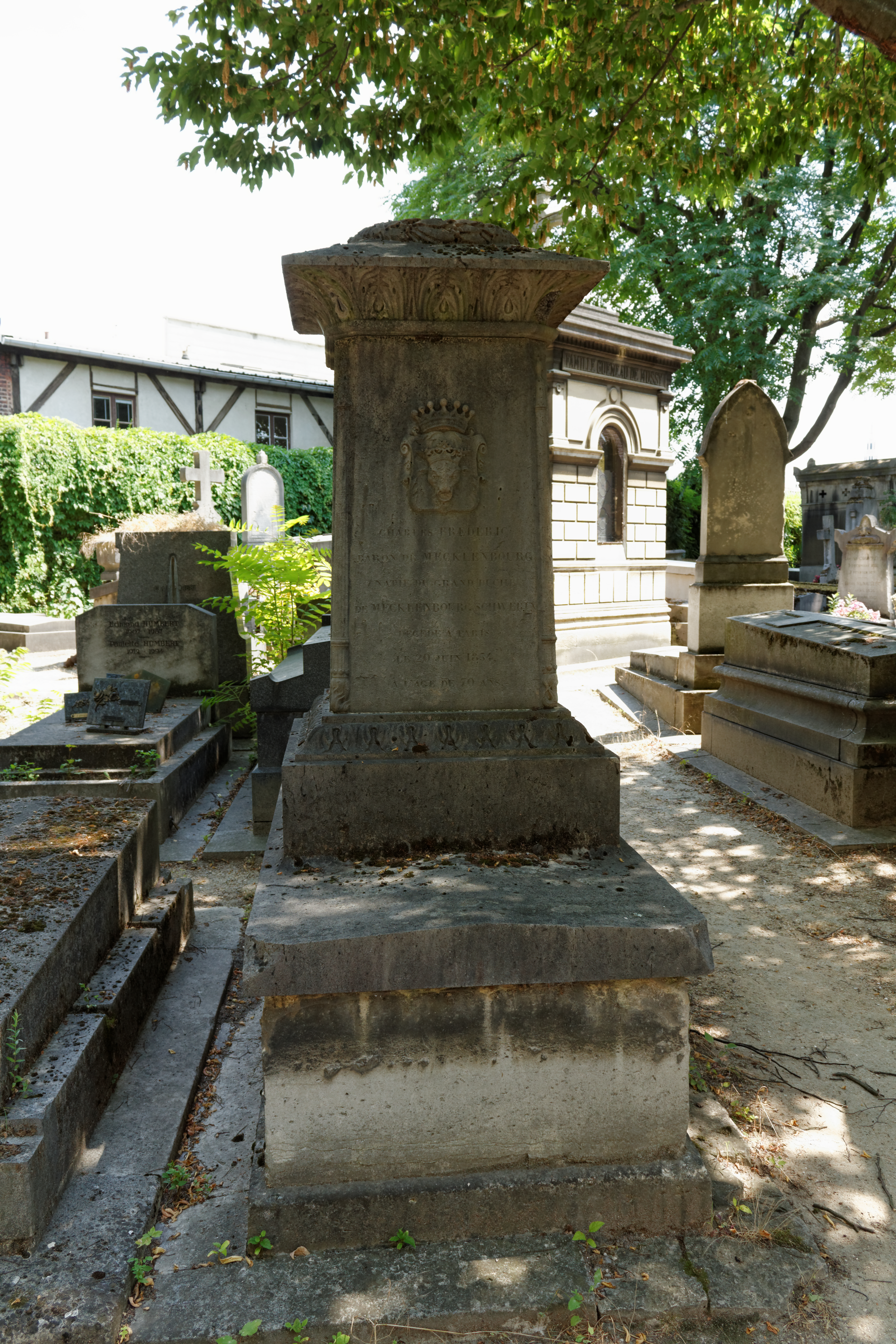 Face antérieure